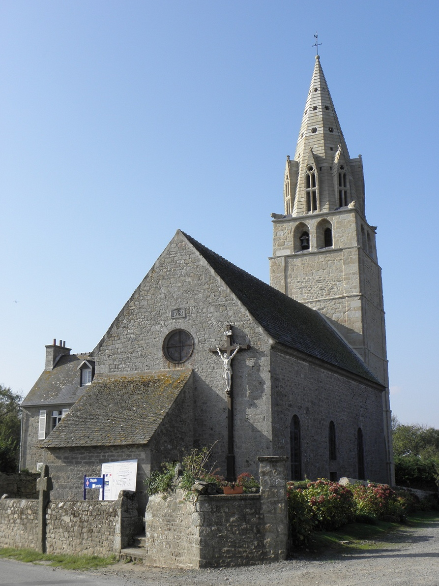 Chevet et flanc nord de la chapelle de Lochrist-an-Izevel en Plounévez-Lochrist (29).